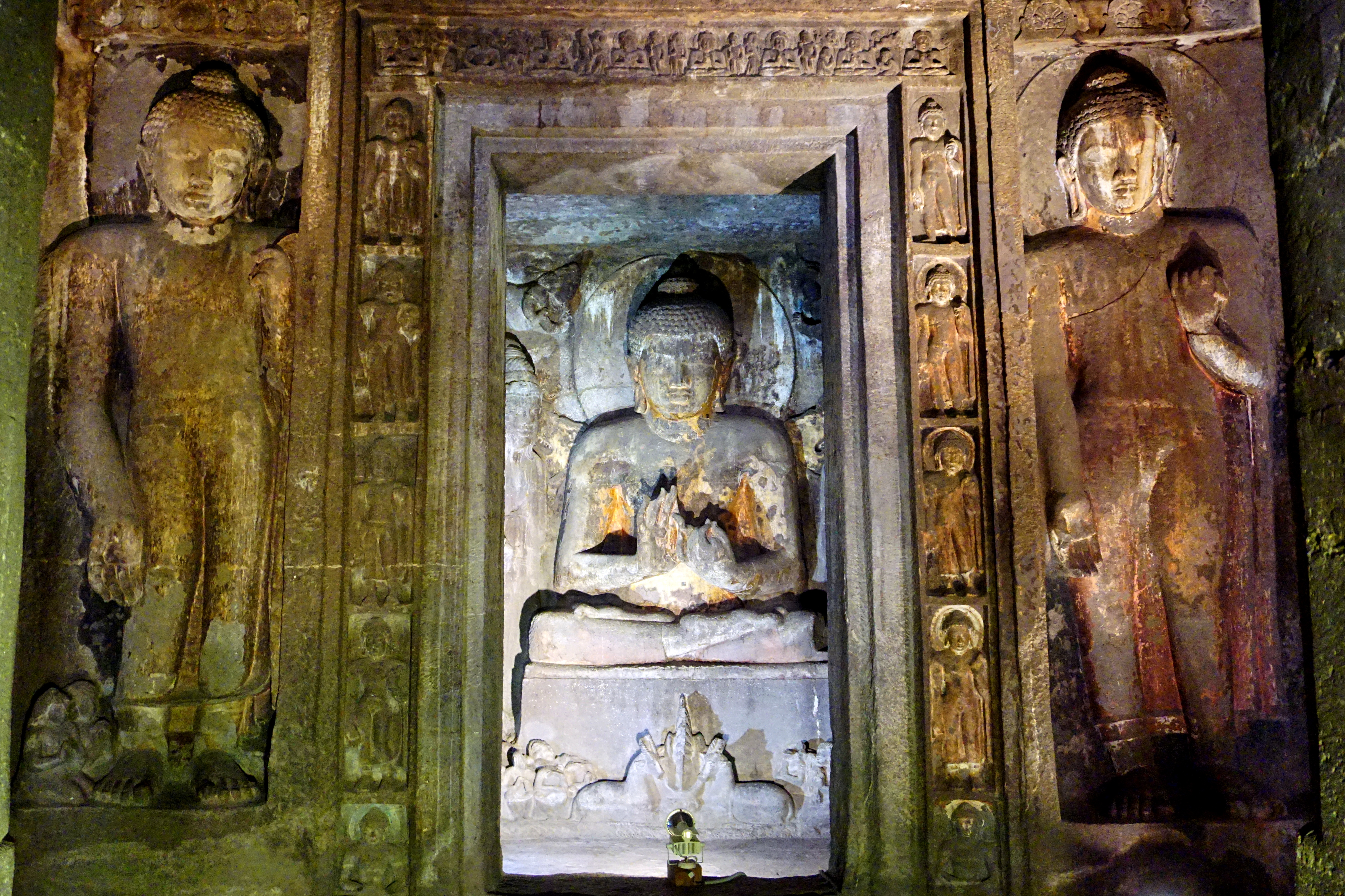 Ajanta Caves, Aurangabad, India